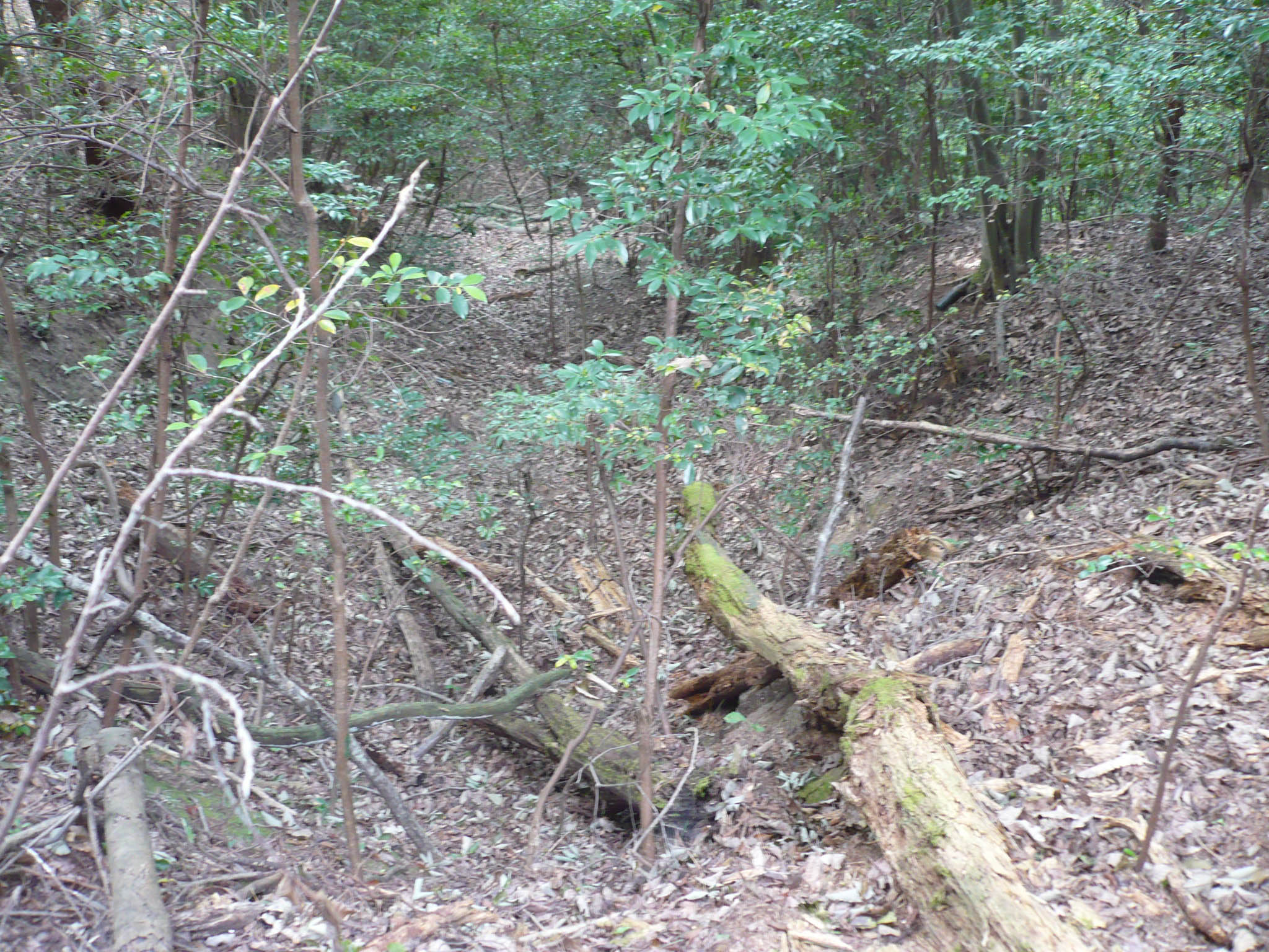 竪堀跡